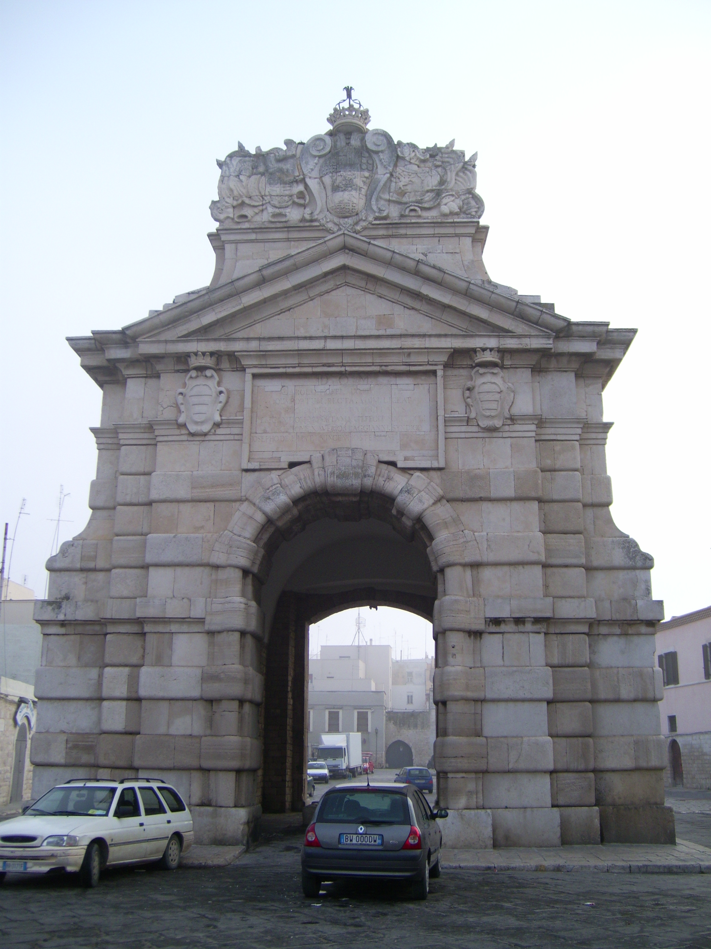 Porta Marina: Fronte nord